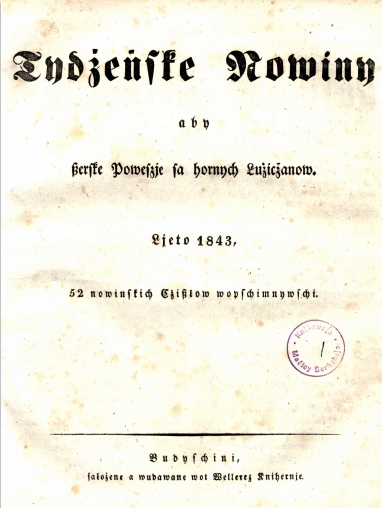 Титульный лист за 1843 год